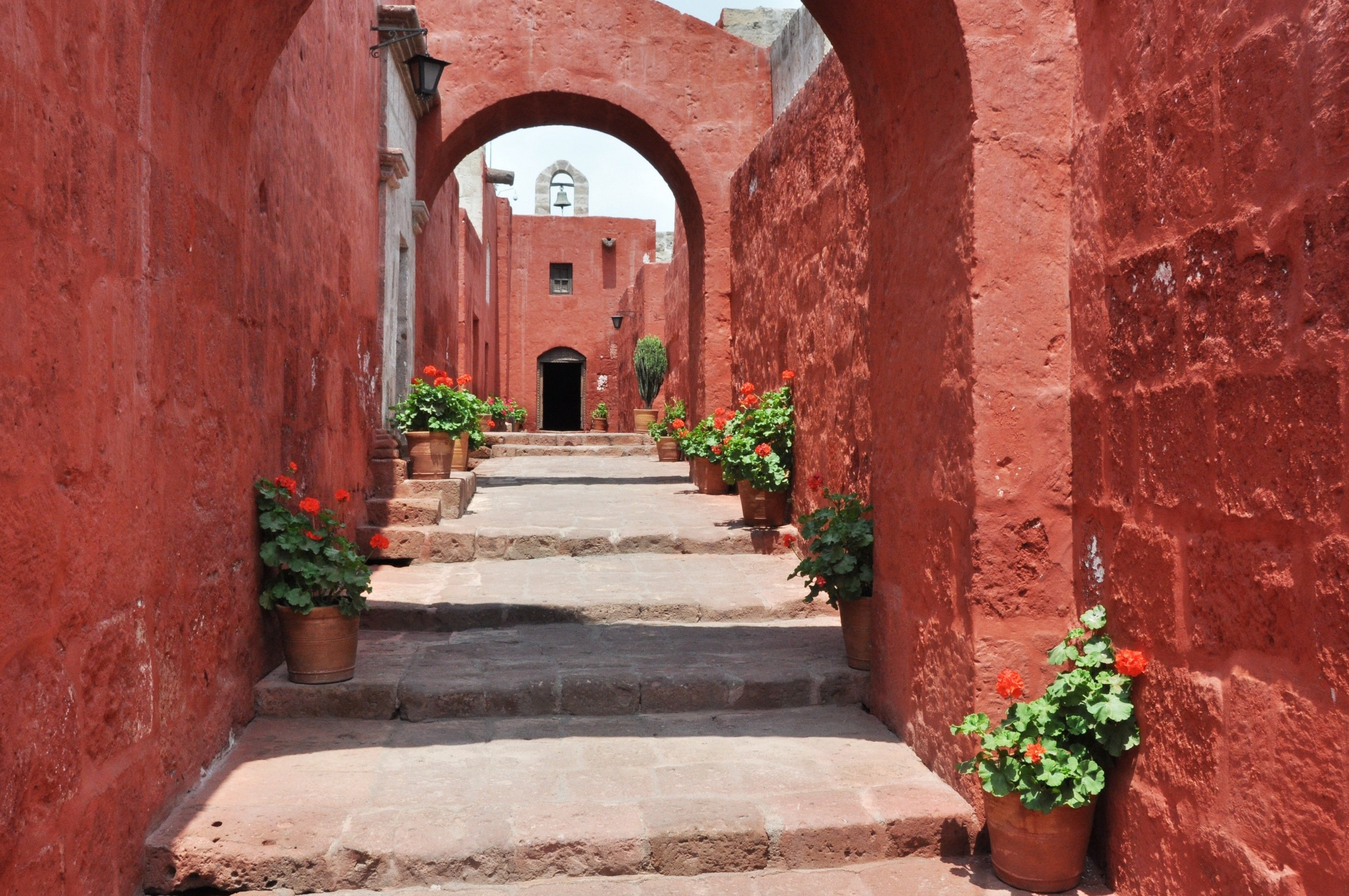 une rue rouge, Arequipa, Couvent Santa Catalina